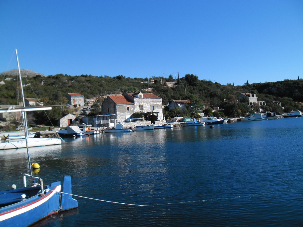 uvala Janska, Banići